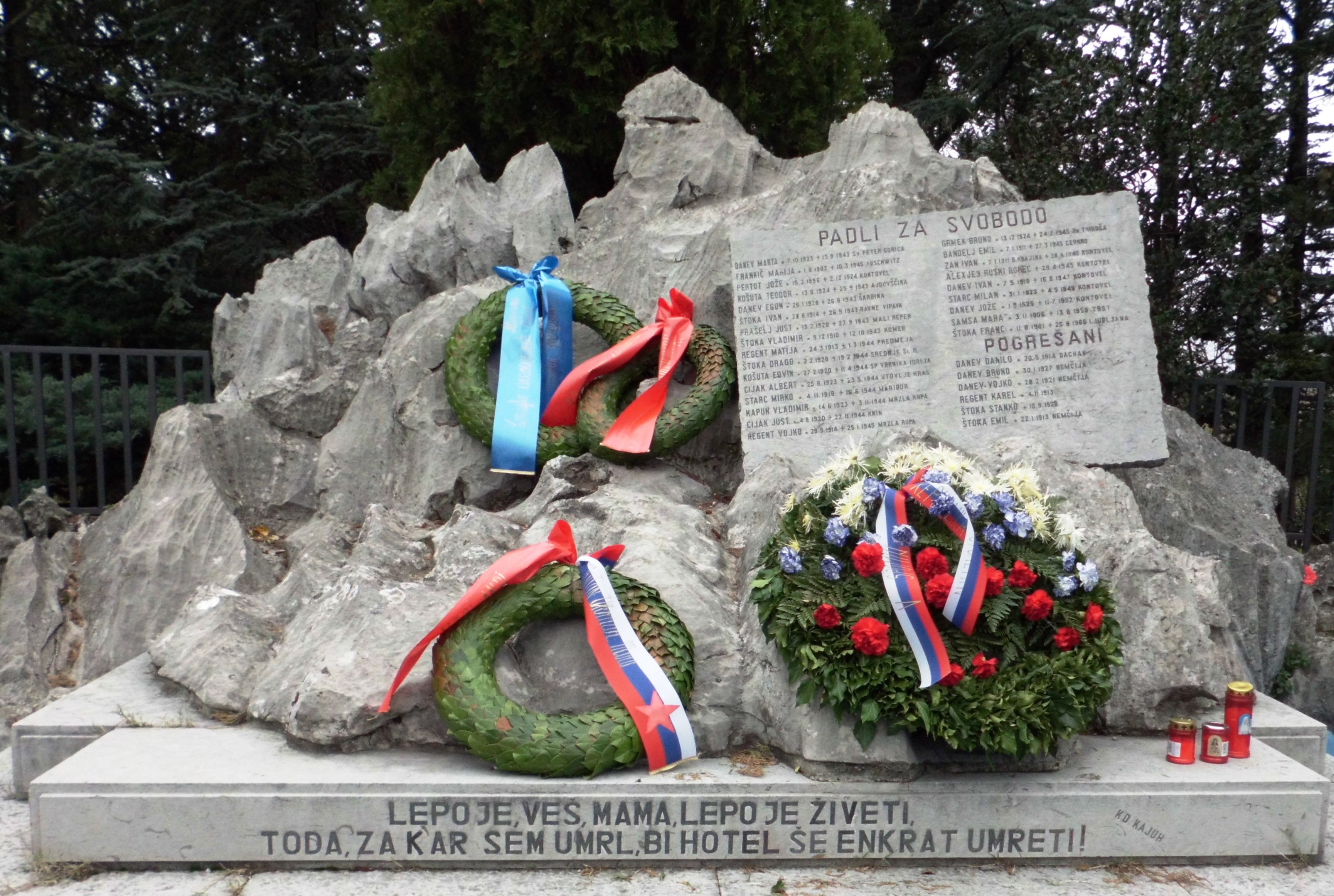 Monumento ai caduti ed ai dispersi nella lotta contro l'oppressione fascista e l'occupazione nazista situato nel cimitero del paese do Contovello (frazione del comune di Trieste)